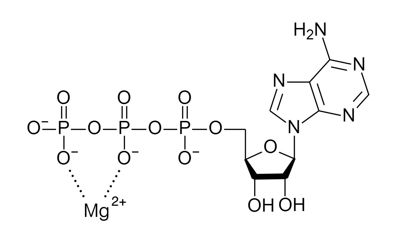 ион Mg 2+ "оттягивает" отрицательно заряженные кислороды